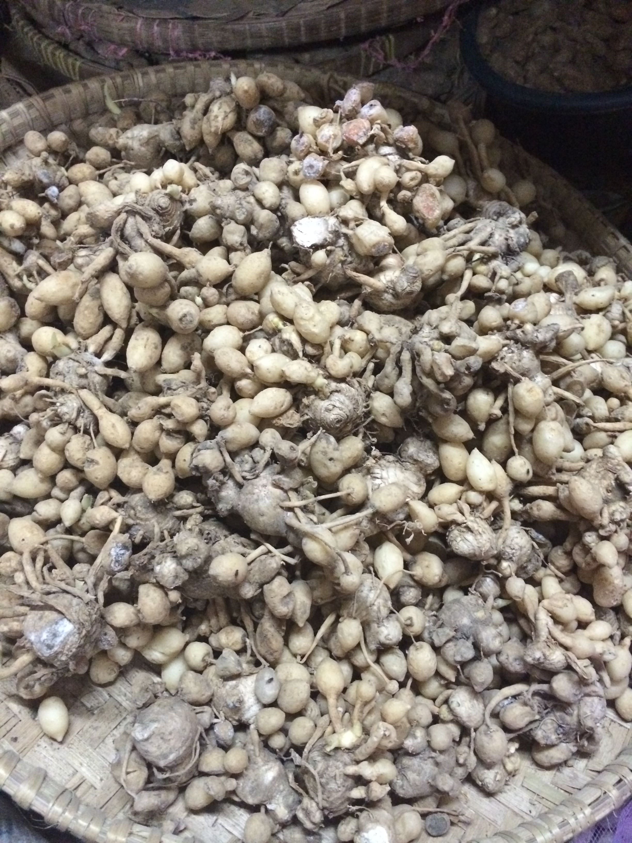 ケンプフェリアロツンダの根